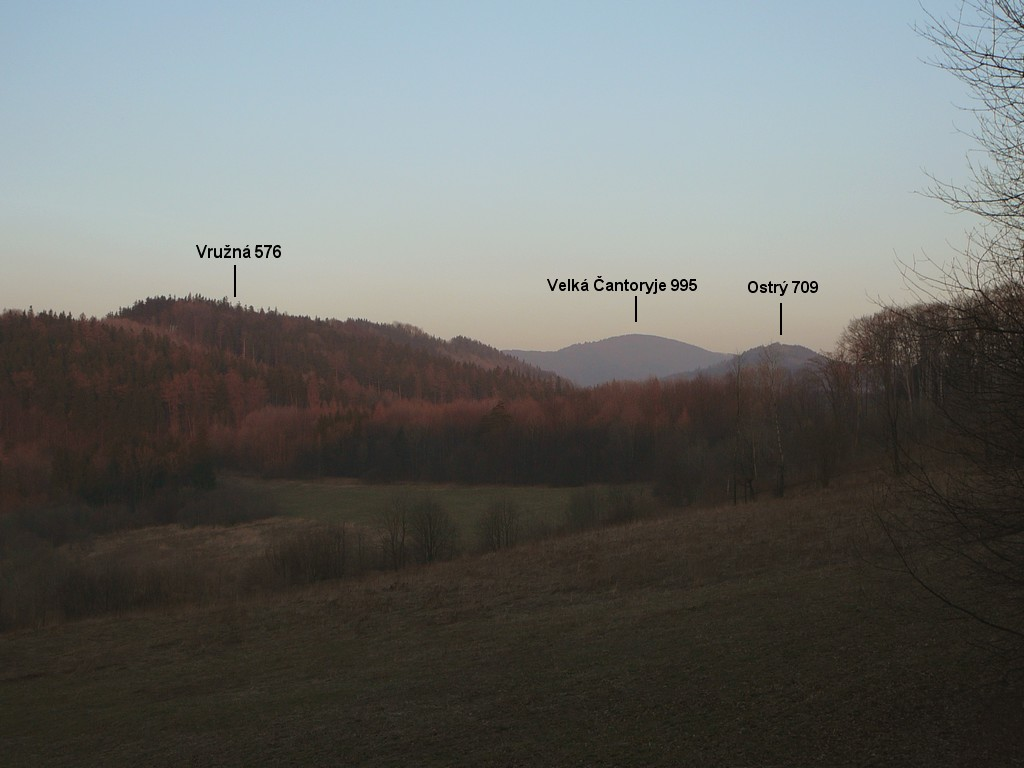 Pohled z Jahodné na Velkou Čantoryji